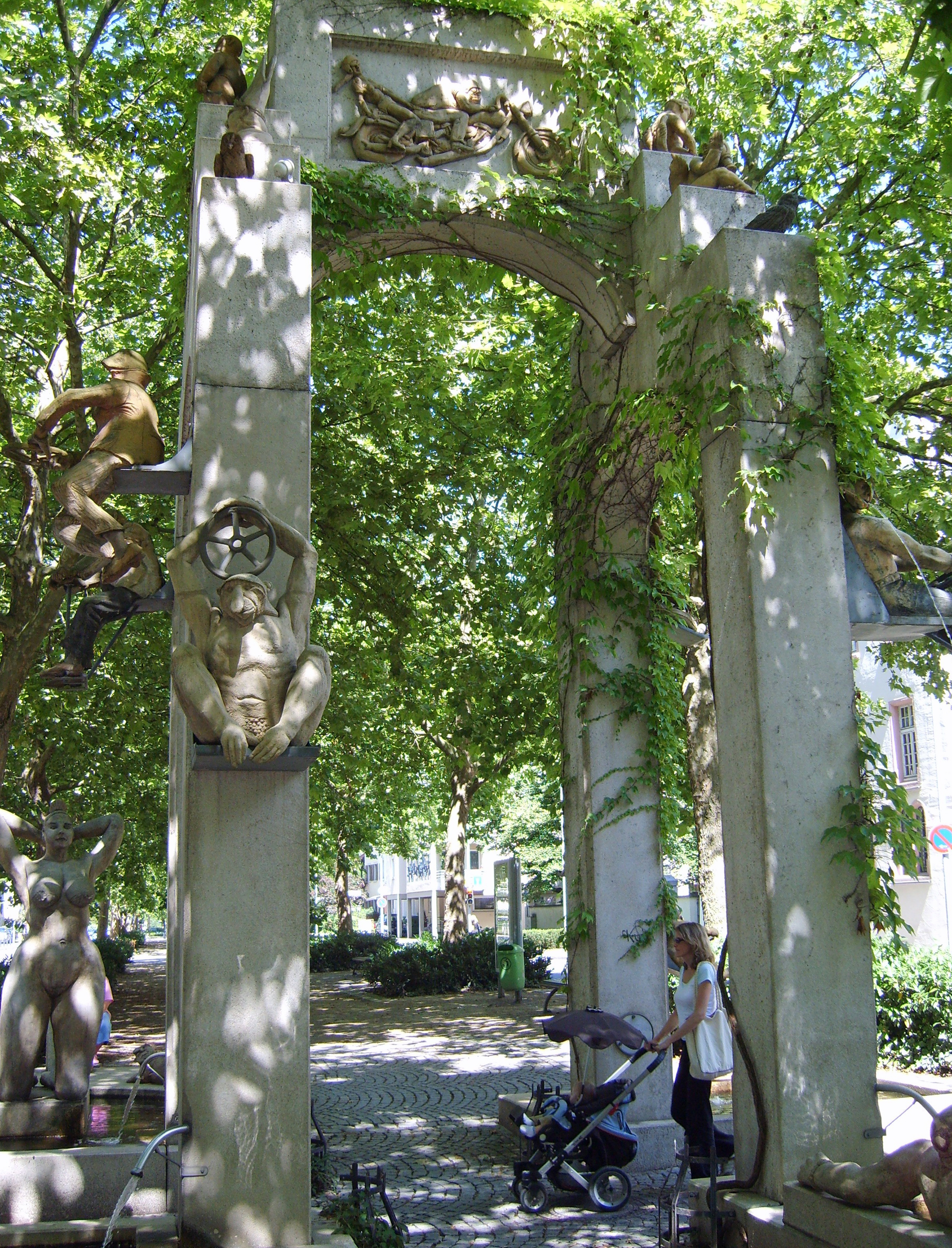 Konstanz Laubebrunnen - Google Maps - Google Earth